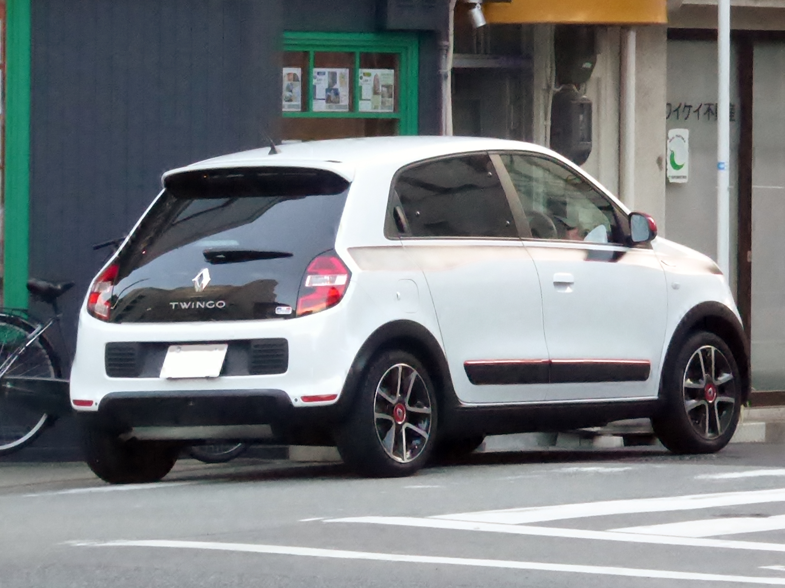 DBA-AHH4B型ルノー・トゥインゴINTENSを撮影。